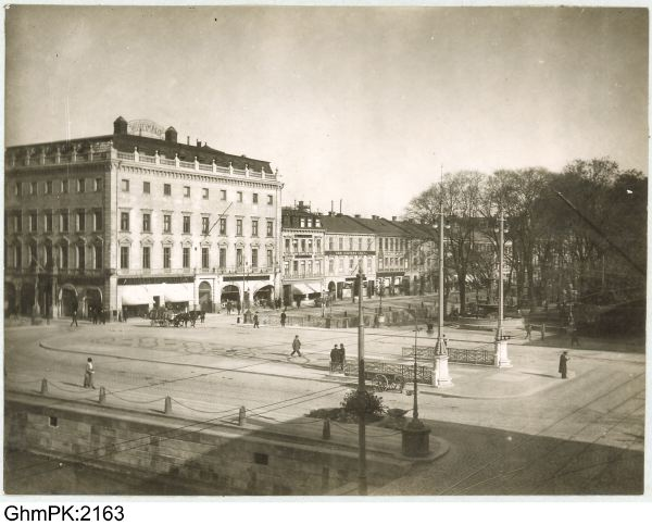 Den underjordiska bekvämlighetsinrättningen i Brunnsparken år 1915.